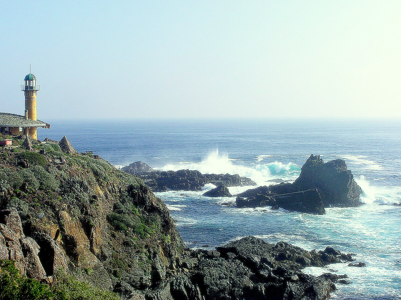 Faro en Ensenada , IV Region , Chile